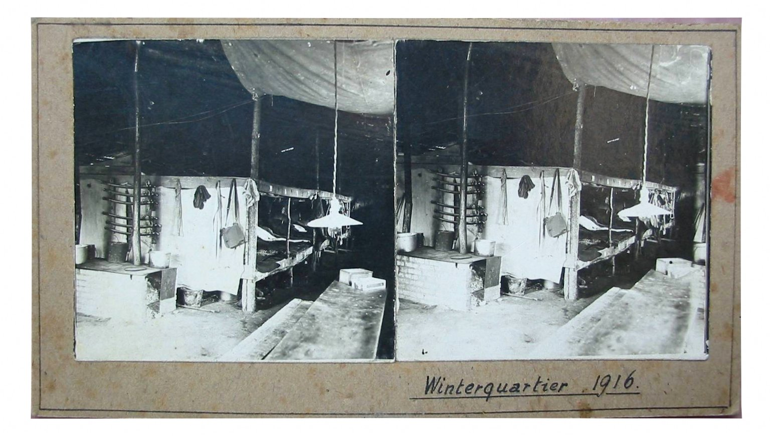 Stereoskopische Aufnahme eines Unterstandes, 1916 im Ersten Weltkrieg